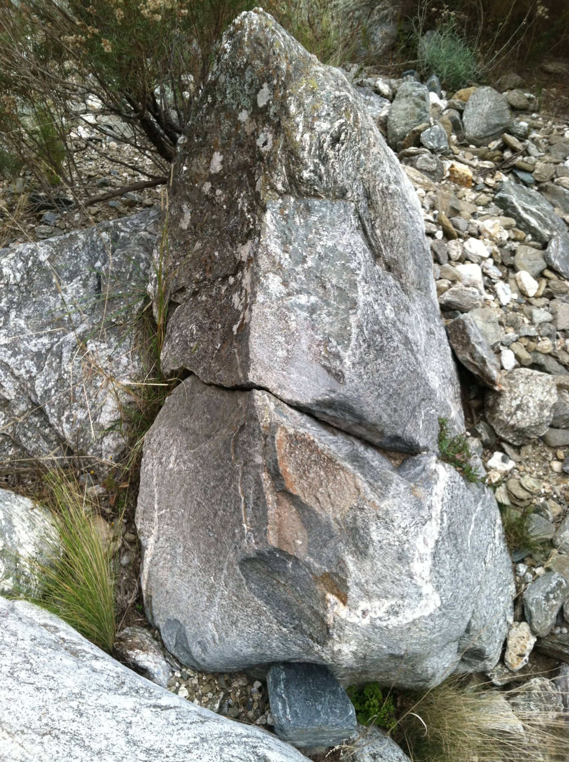 Reserva Mogote Bayo